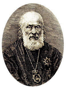 Архиепископ Михаил (Голубович)